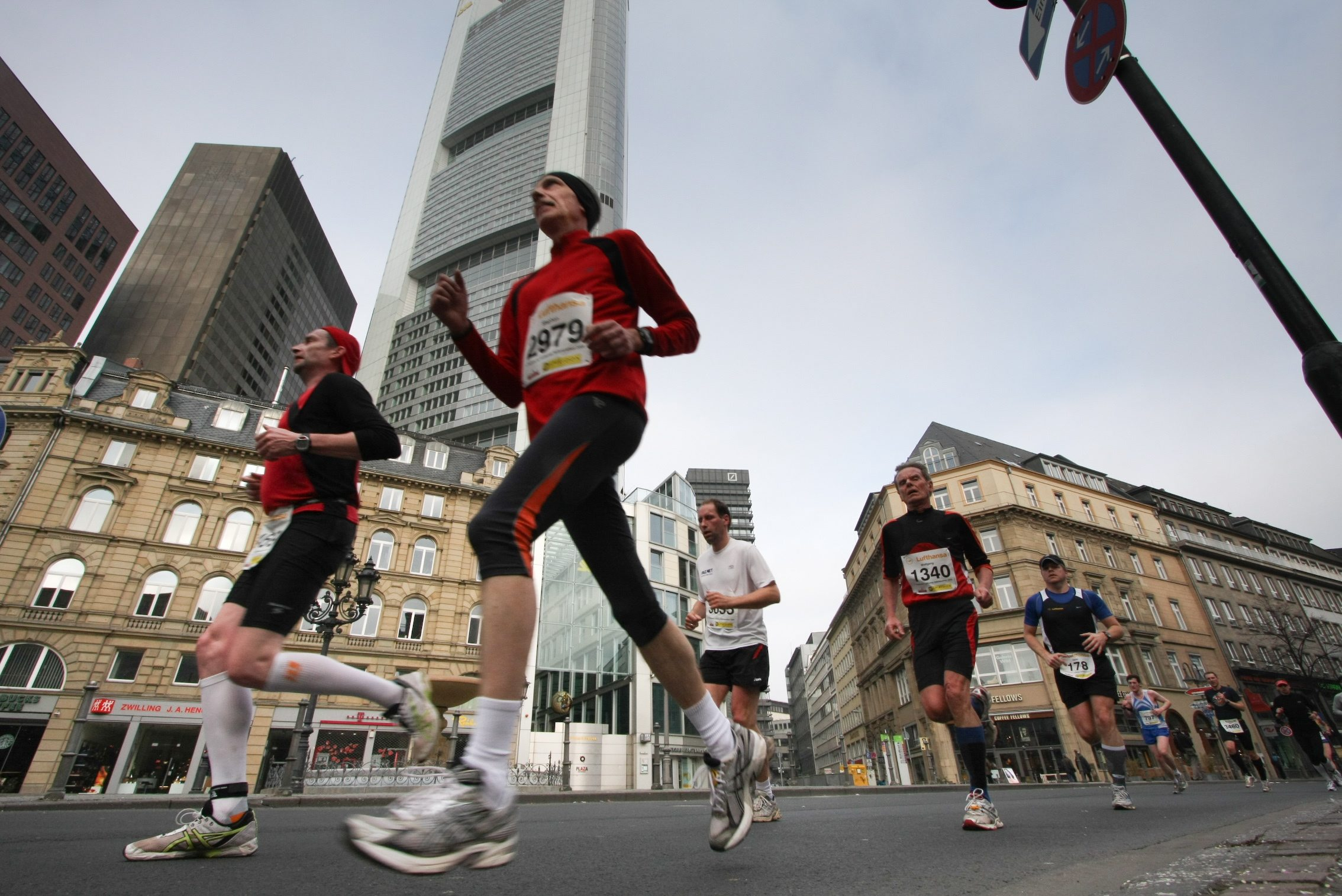 Frankfurter Halbmarathon, 2009